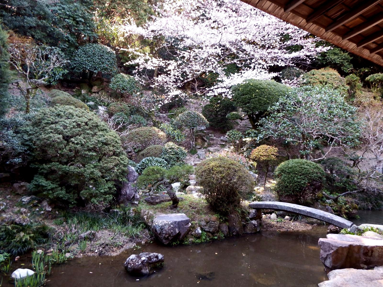 金刀比羅宮の表書院